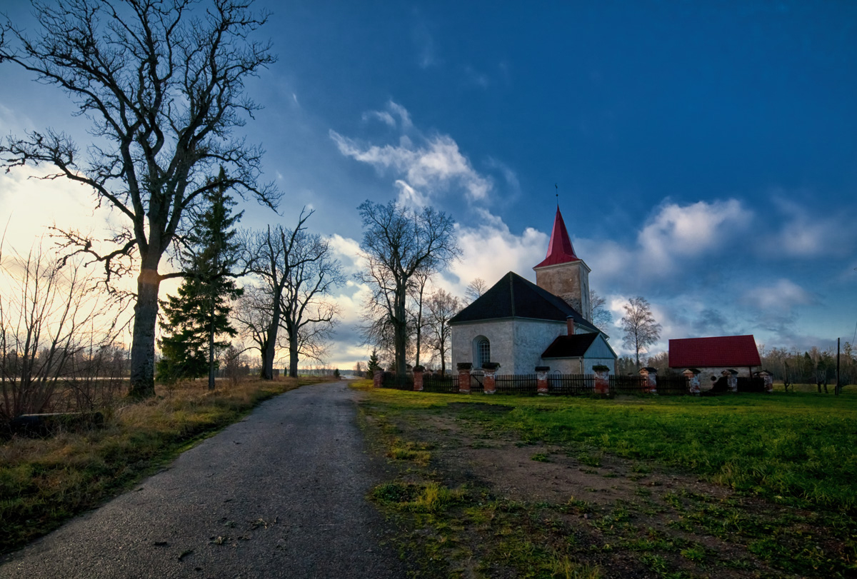 Stendes luterāņu baznīca un kapliča, Dižstende